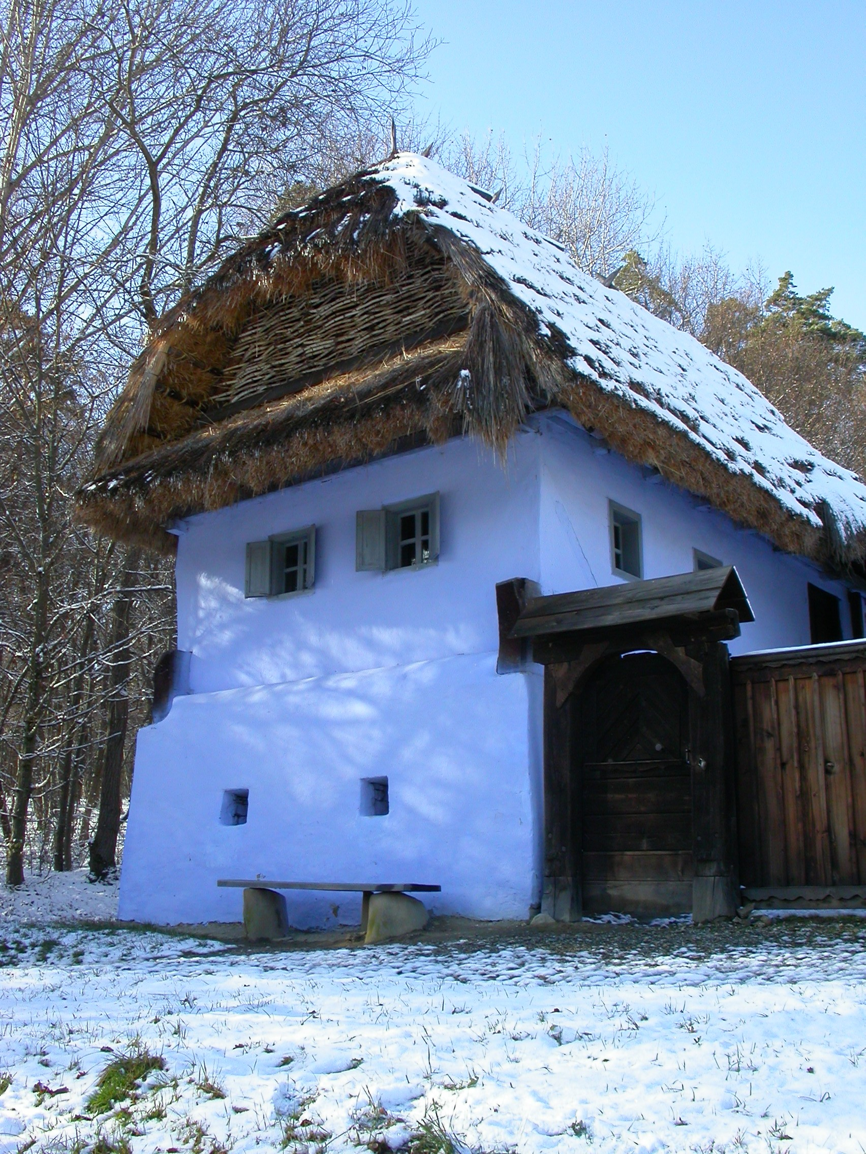 Muzeul Civilizației Populare Tradiționale ASTRA, 1963 (gospodărie de prelucrare cânepa și funărit de la Săsăuș